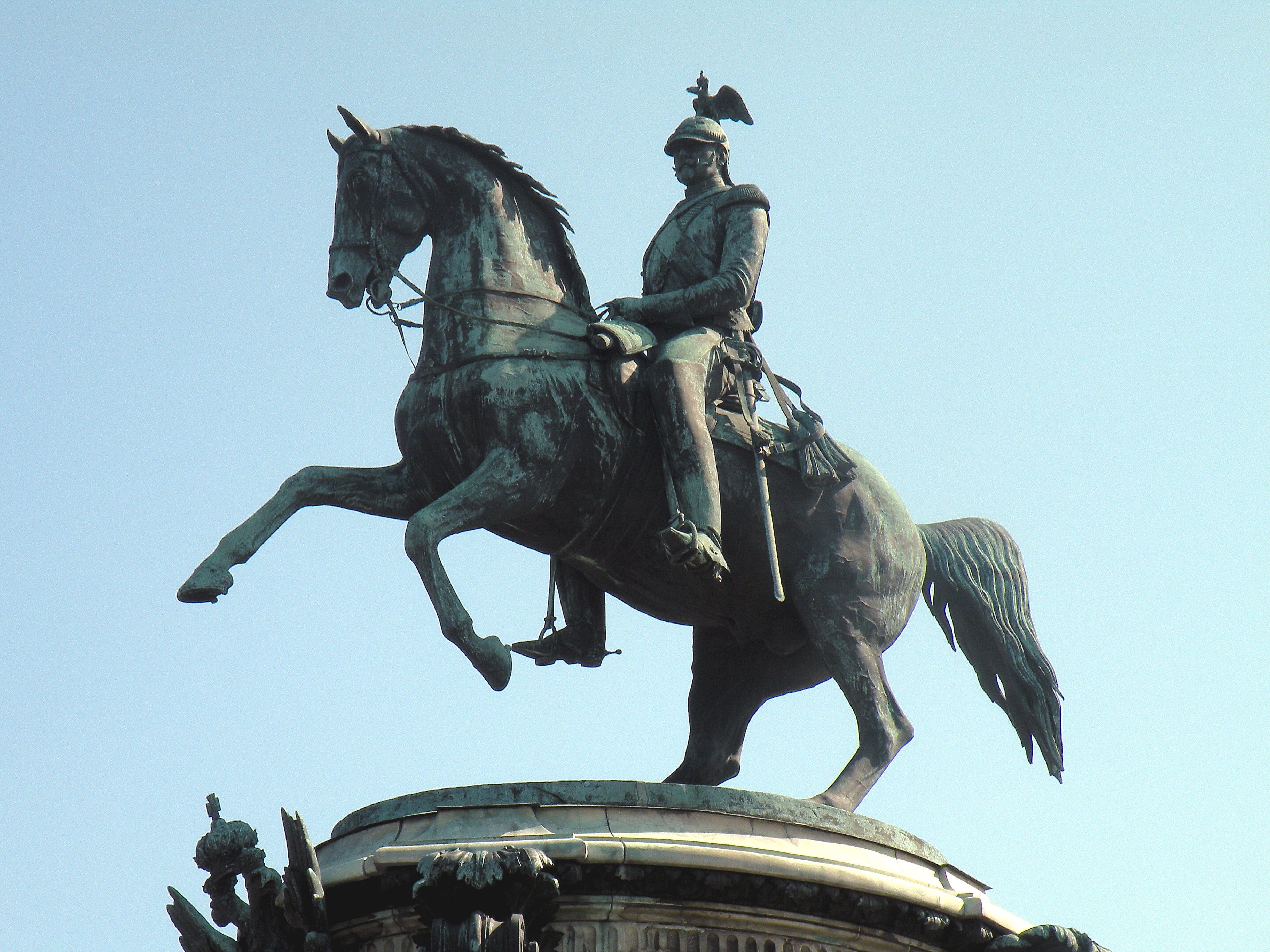 Клодт.Памятник Императору Николаю Первому